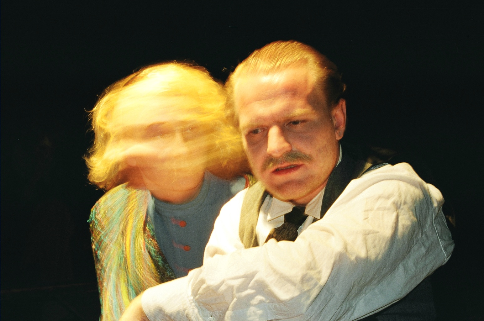 Madis Kõiv "Ennola" (2003). Lavastaja Taago Tubin, kunstnik Piret Räni, muusikaline kujundus Toivo ja Stella Sõmer. Fotol vasakult Ülle Lepp ja Tarmo Tagamets.